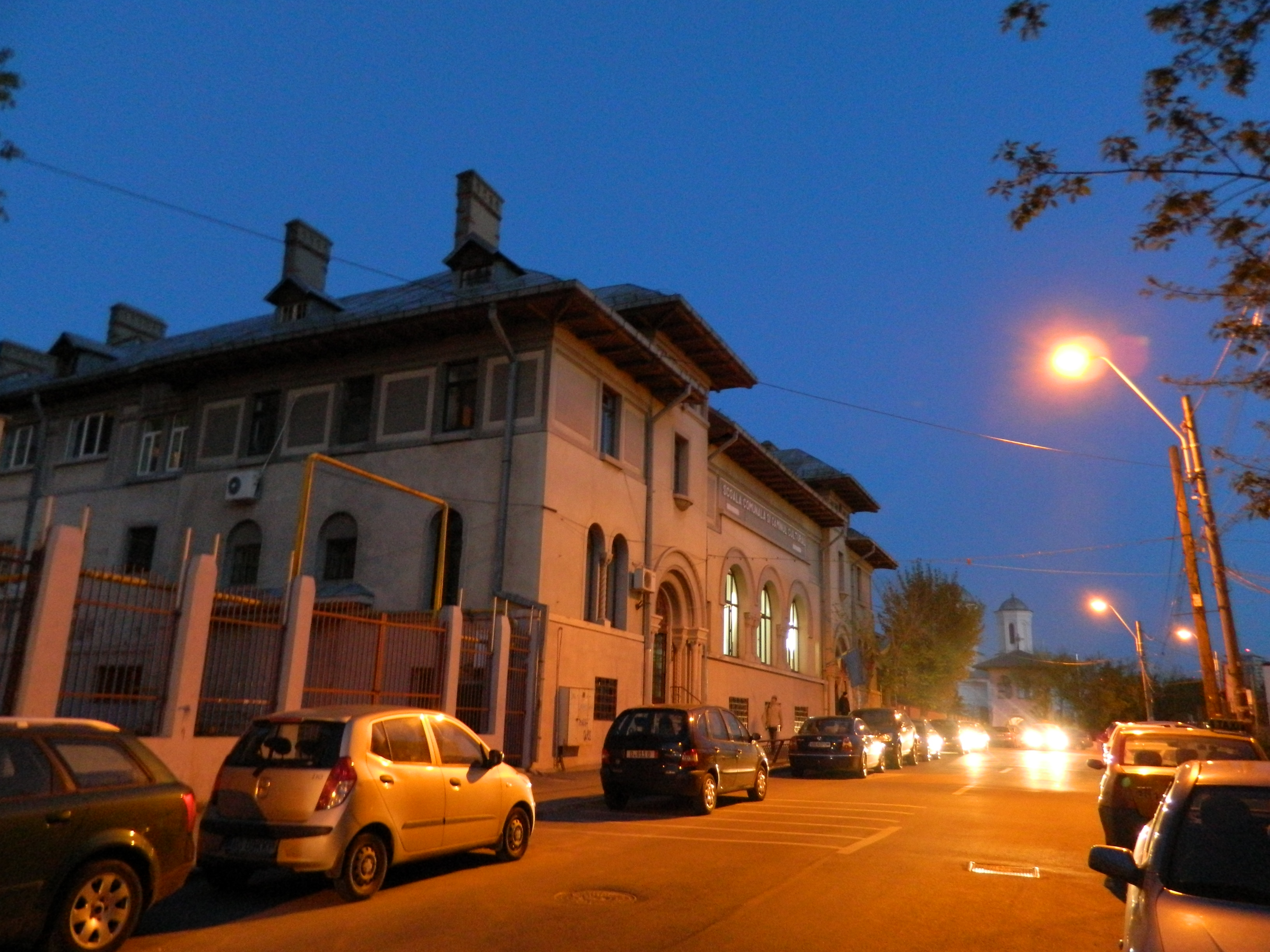 Școala comercială de pe Str. Foișorului 106, sector 3, București